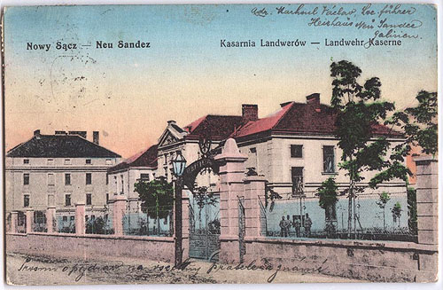 k.k. Landwwehr Kaserne in Neu Sandez